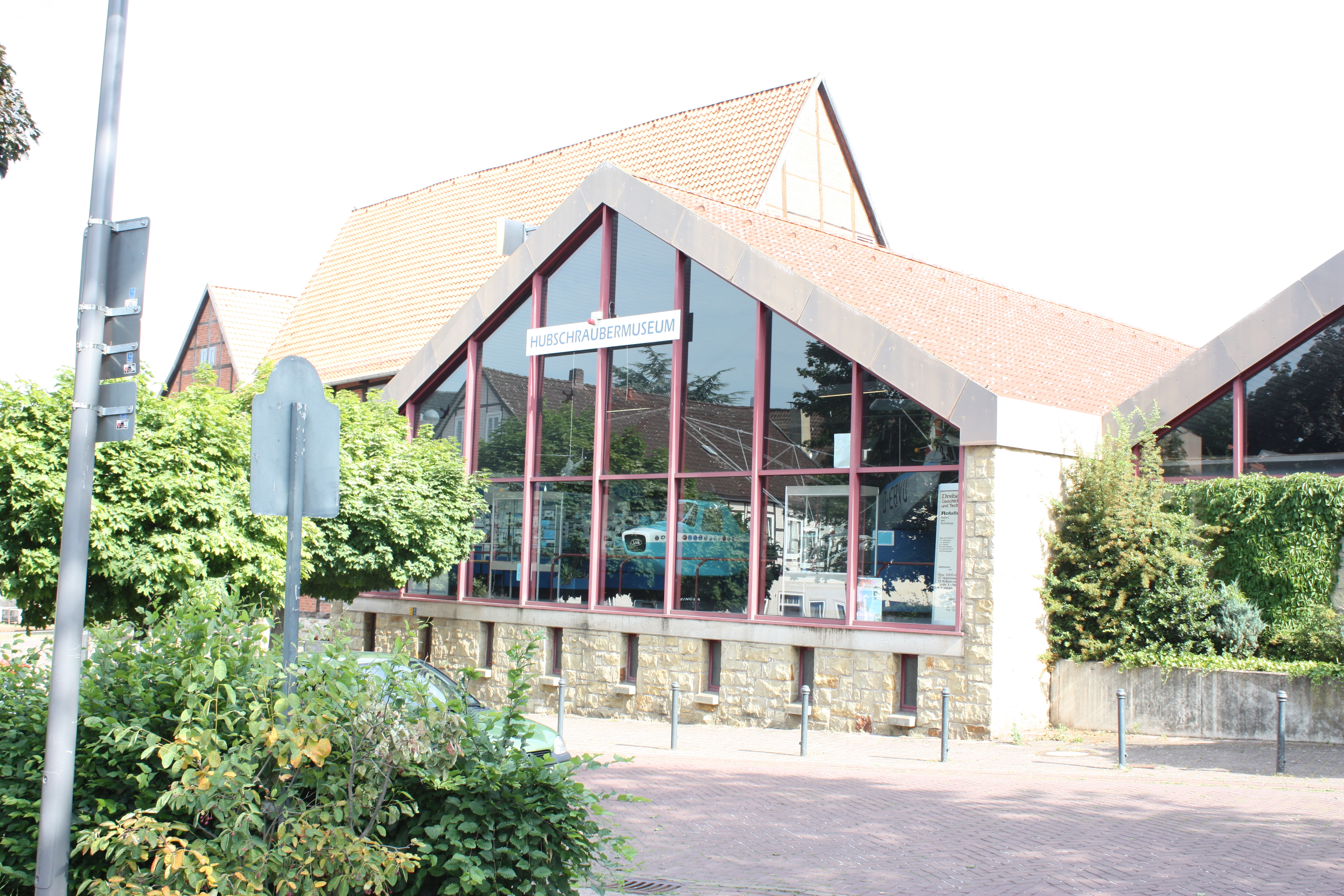 Hubschraubermuseum Bückeburg